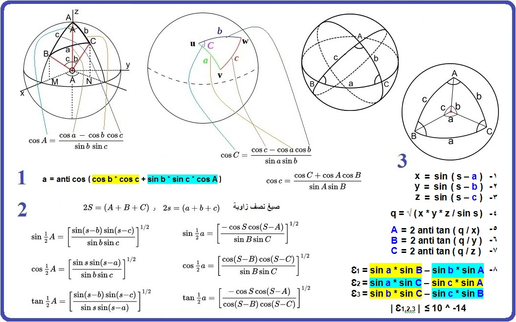 مختصر لأهم معادلات حساب المثلثات